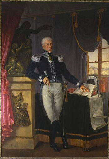 Portrait du général de Boigne peint par Pierre Emmanuel Moreau en 1830